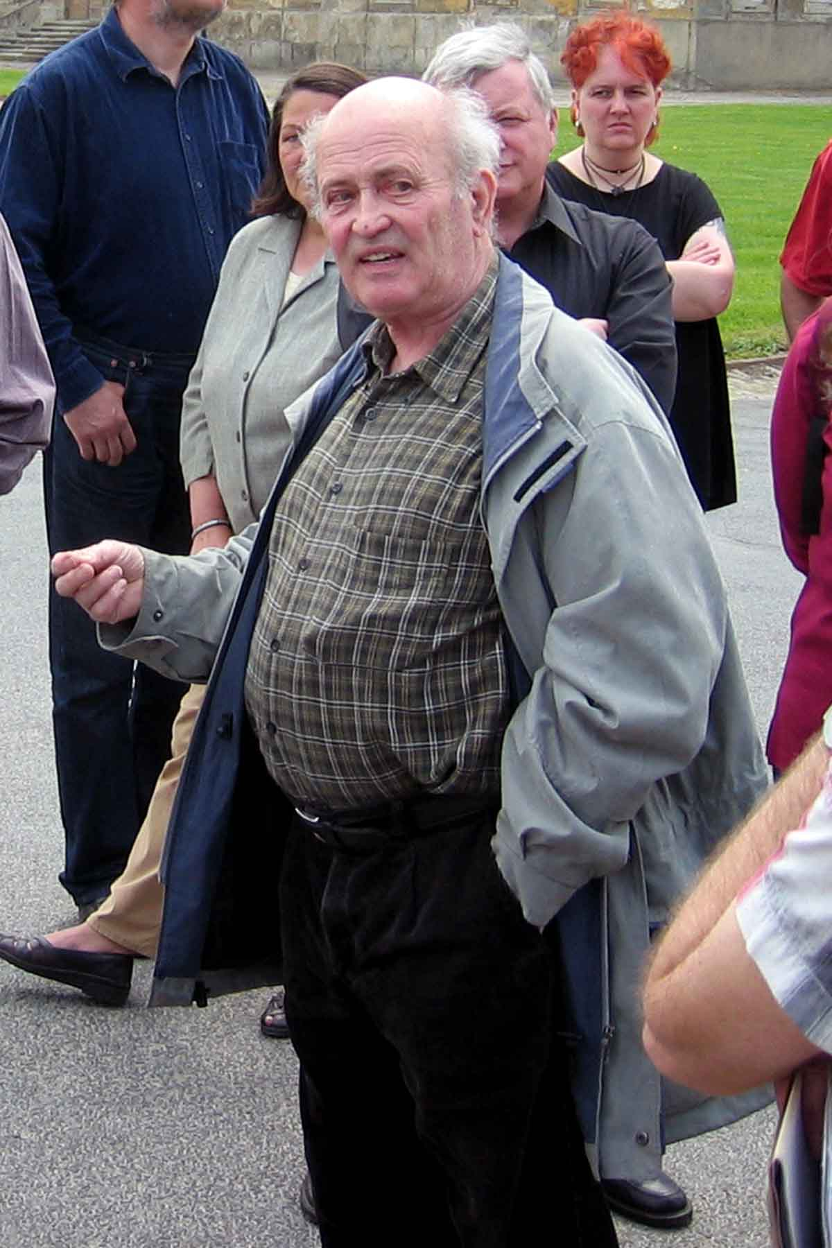 Gerhard Billig am 1. Mai 2004 auf dem Gelände des Schloß Hubertusburg in Wermsdorf